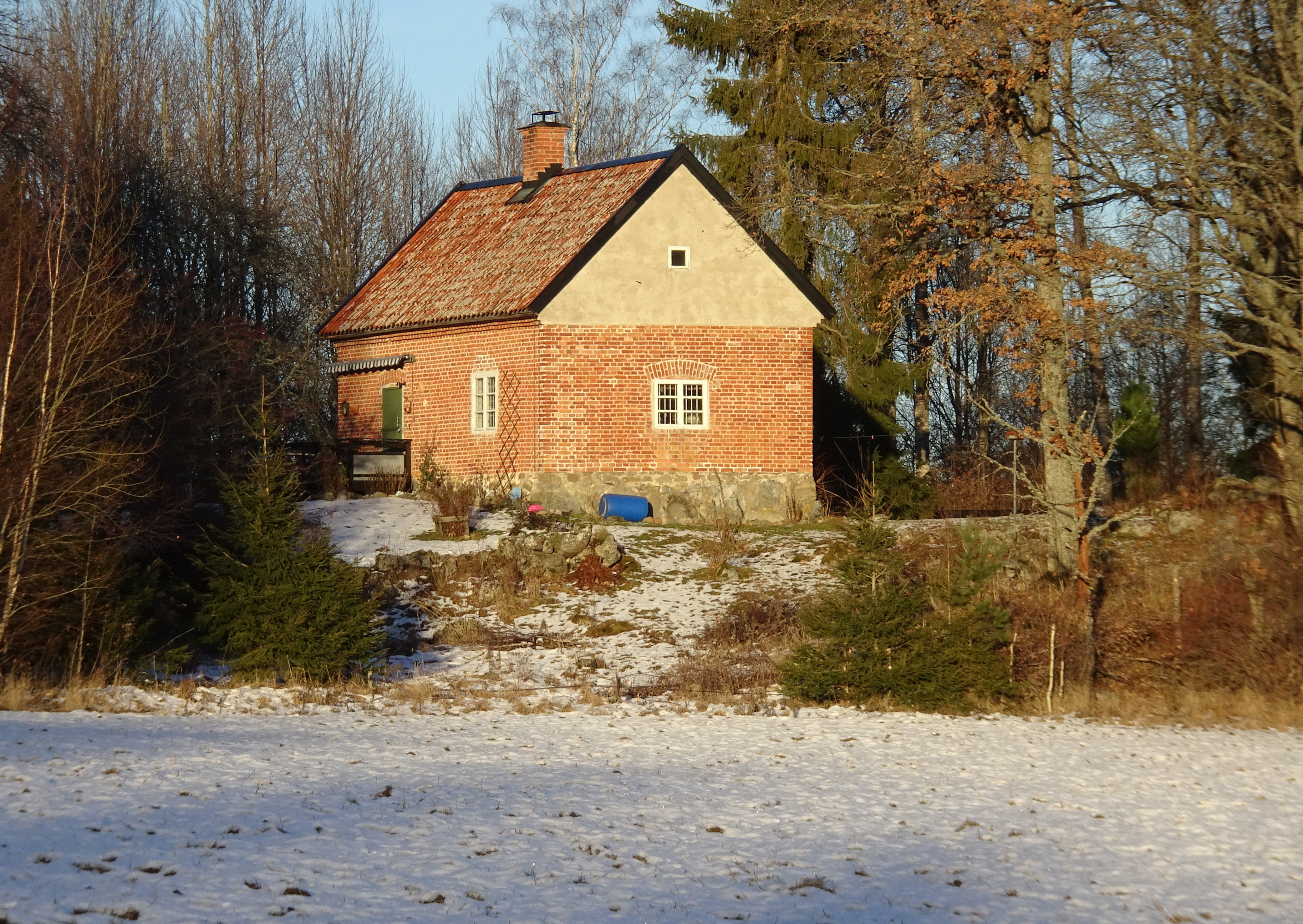 Torpet Ängsstugan, låg under Vällinge, det enda kvarvarande torp i Salems kommun som är uppfört i tegel.